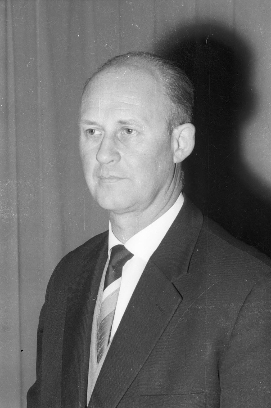 ordentlicher Professor für Soziologie und Sozialwissenschaften an der Christian-Albrechts-Universität (CAU).